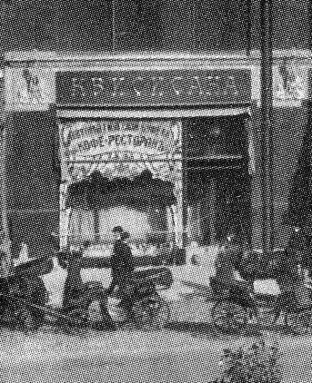 Здание Московского купеческого банка, 1903 год.